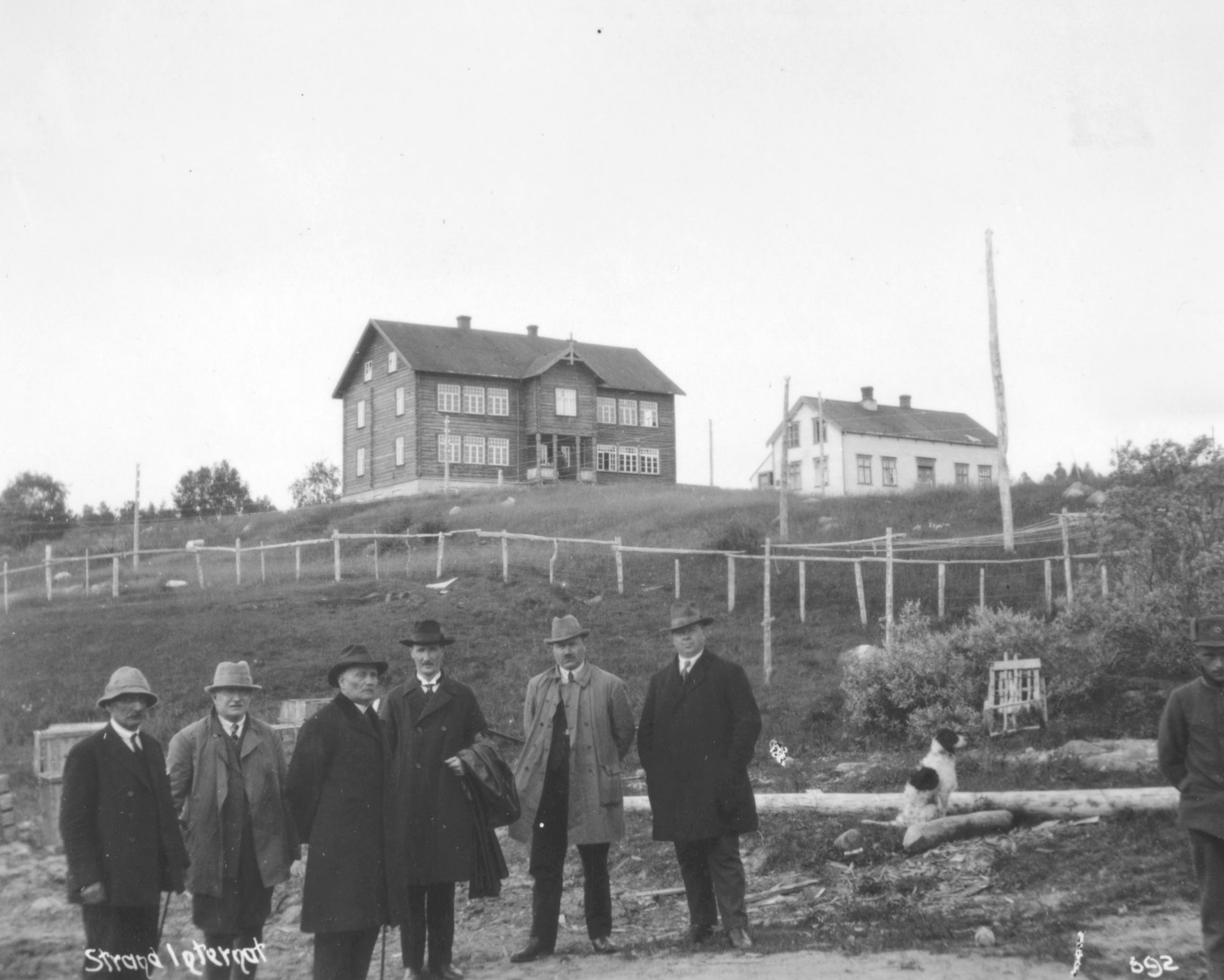 Stortingets jernbanekomite ved Strand internatskole i Sør-Varanger